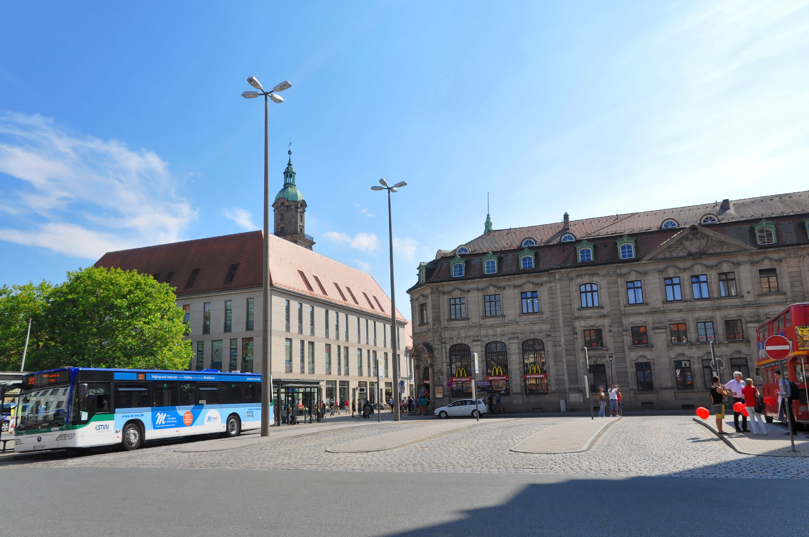 Wikipedia 13. Fotoworkshop Bilder aus Erlangen